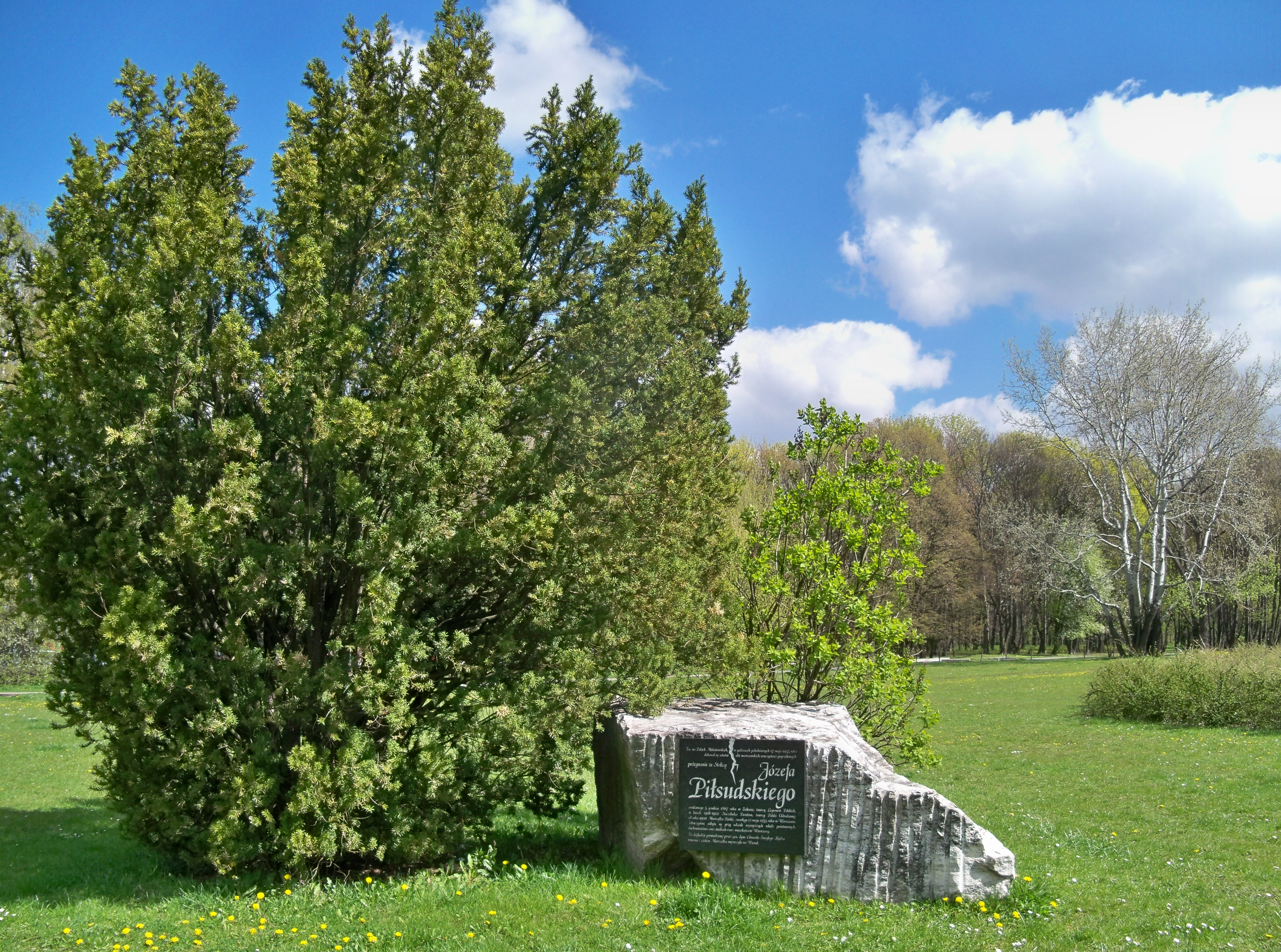 Głaz pamiątkowy na Polu Mokotowskim (parku im. Józefa Piłsudskiego)